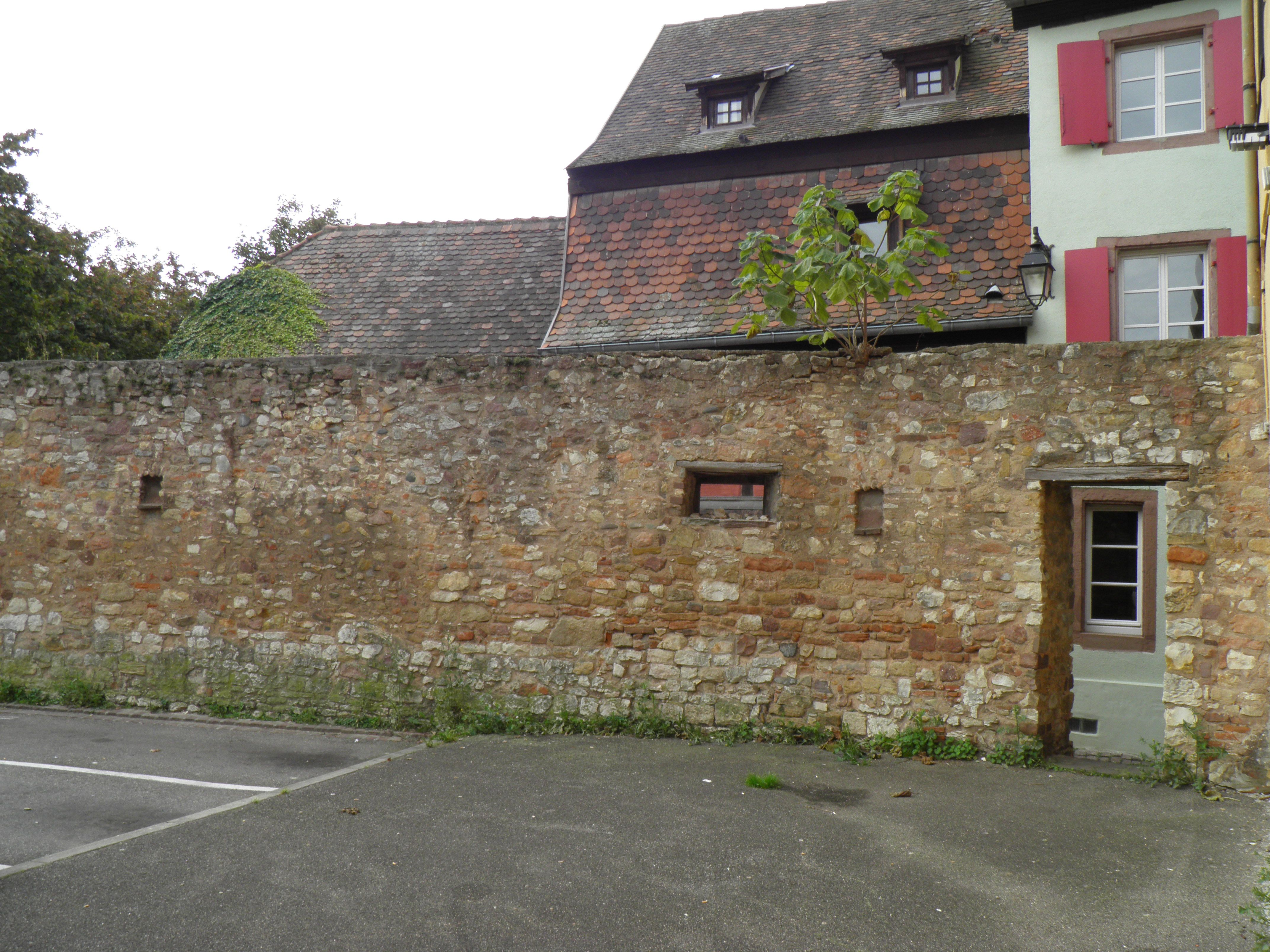 Enceinte médiévale dans la rue de l'Enceinte à Colmar à Colmar (Haut-Rhin, France).